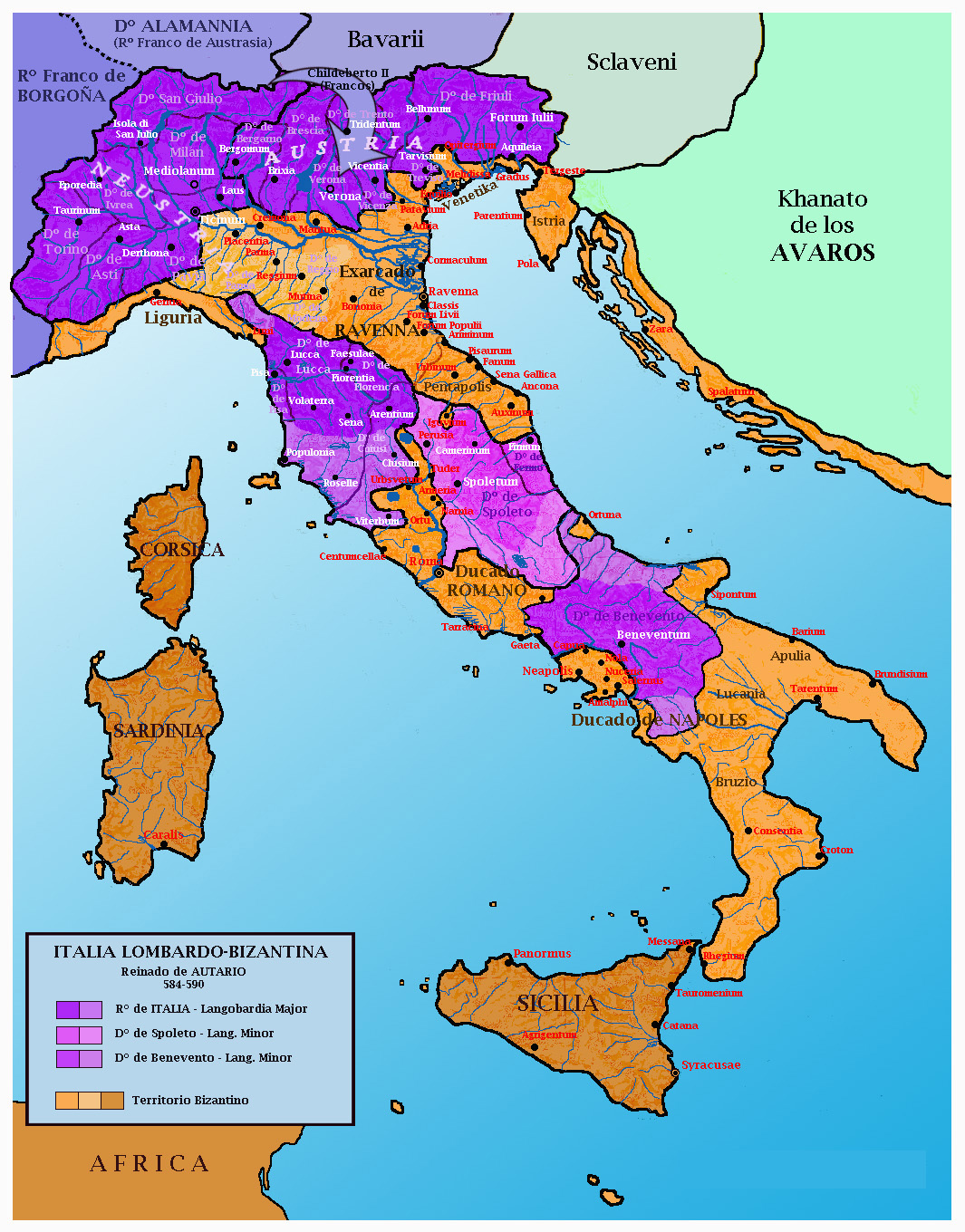 Mappa Italia Longobardo-Bizantina 590. Re Autario